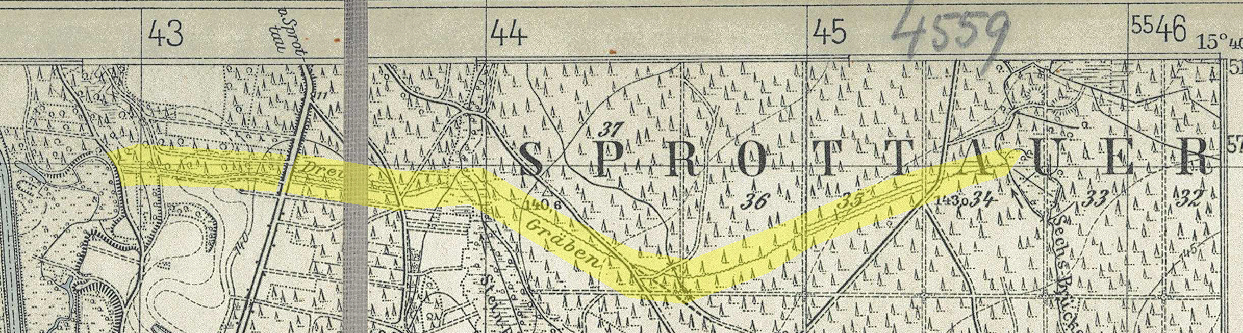 Messtischblatt 4559 Ober Leschen Ausschnitt (oben rechts) mit Hervorhebung der Landwehr Drei Gräben.